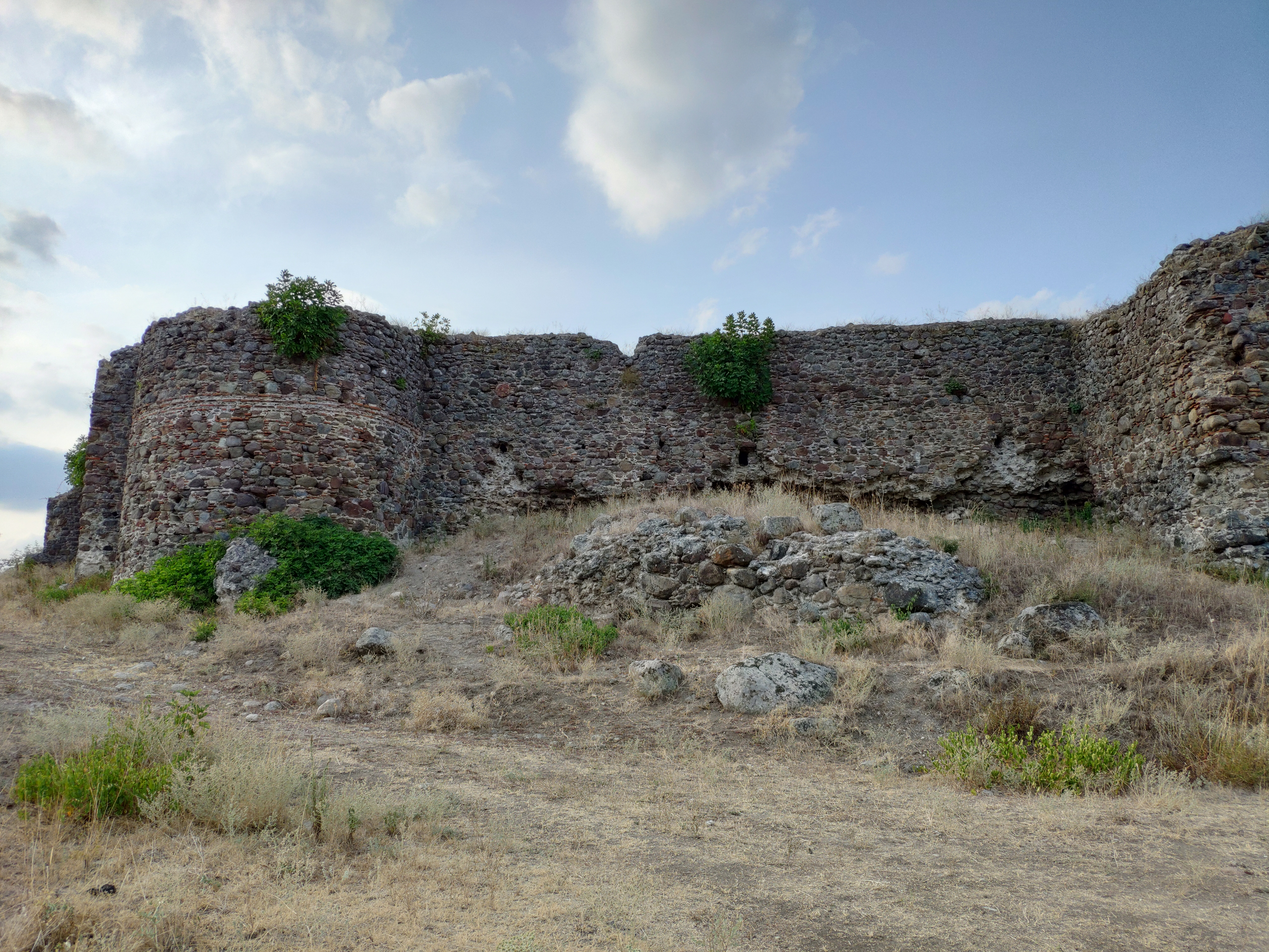 Κάστρο Μογλενών«Κάστρο Μογλενών»